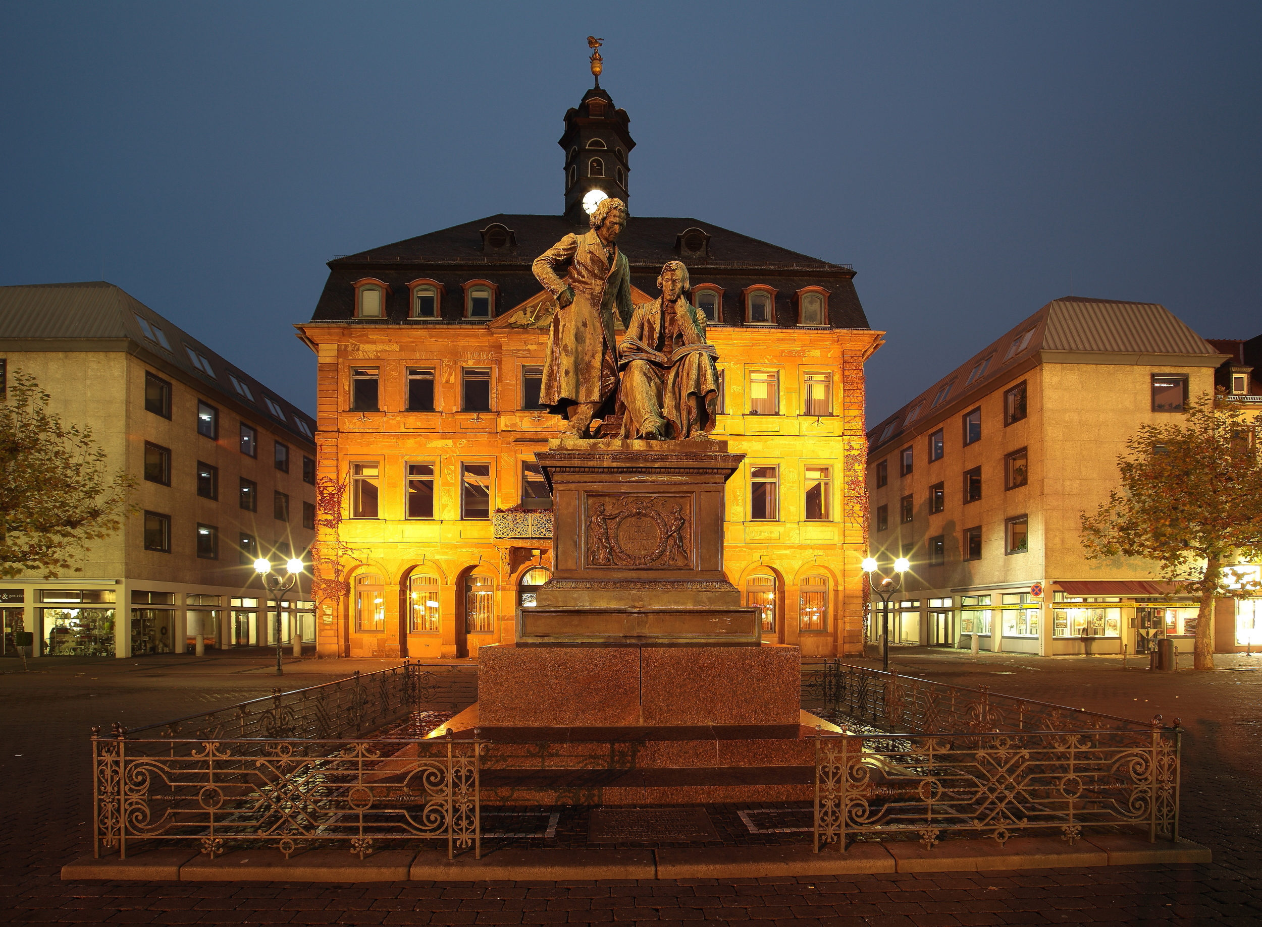 Grimm-Denkmal in HanauThis is a photograph of an architectural monument.